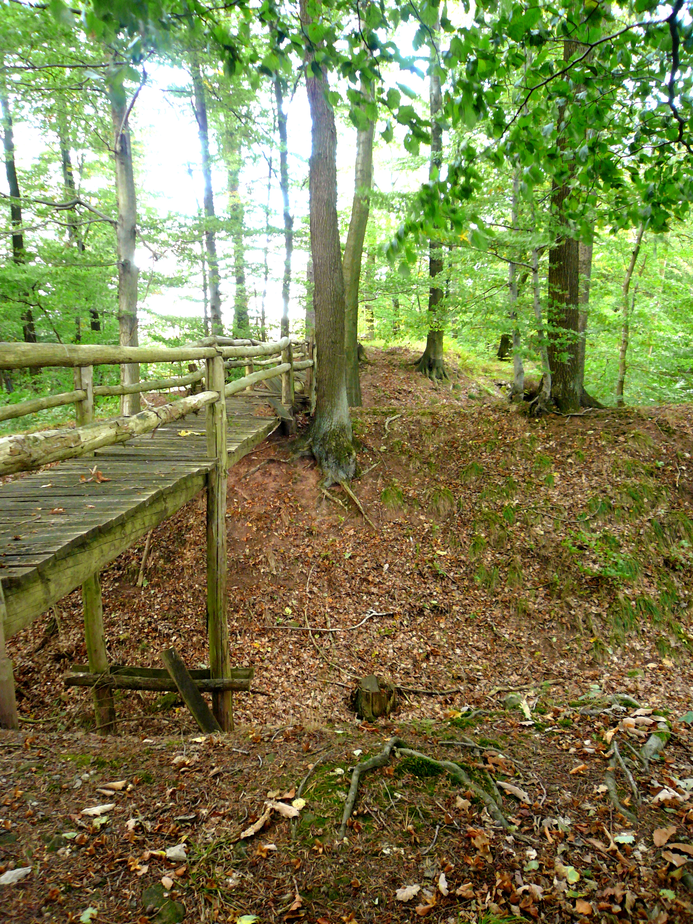 Turmburg bei Trögen / Ludwigshöhe über dem Espoldetal, Blick von Süden über die beiden Gräben zum Burgplateau